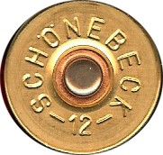 Boden einer Schrotpatrone mit Kaliberangabe